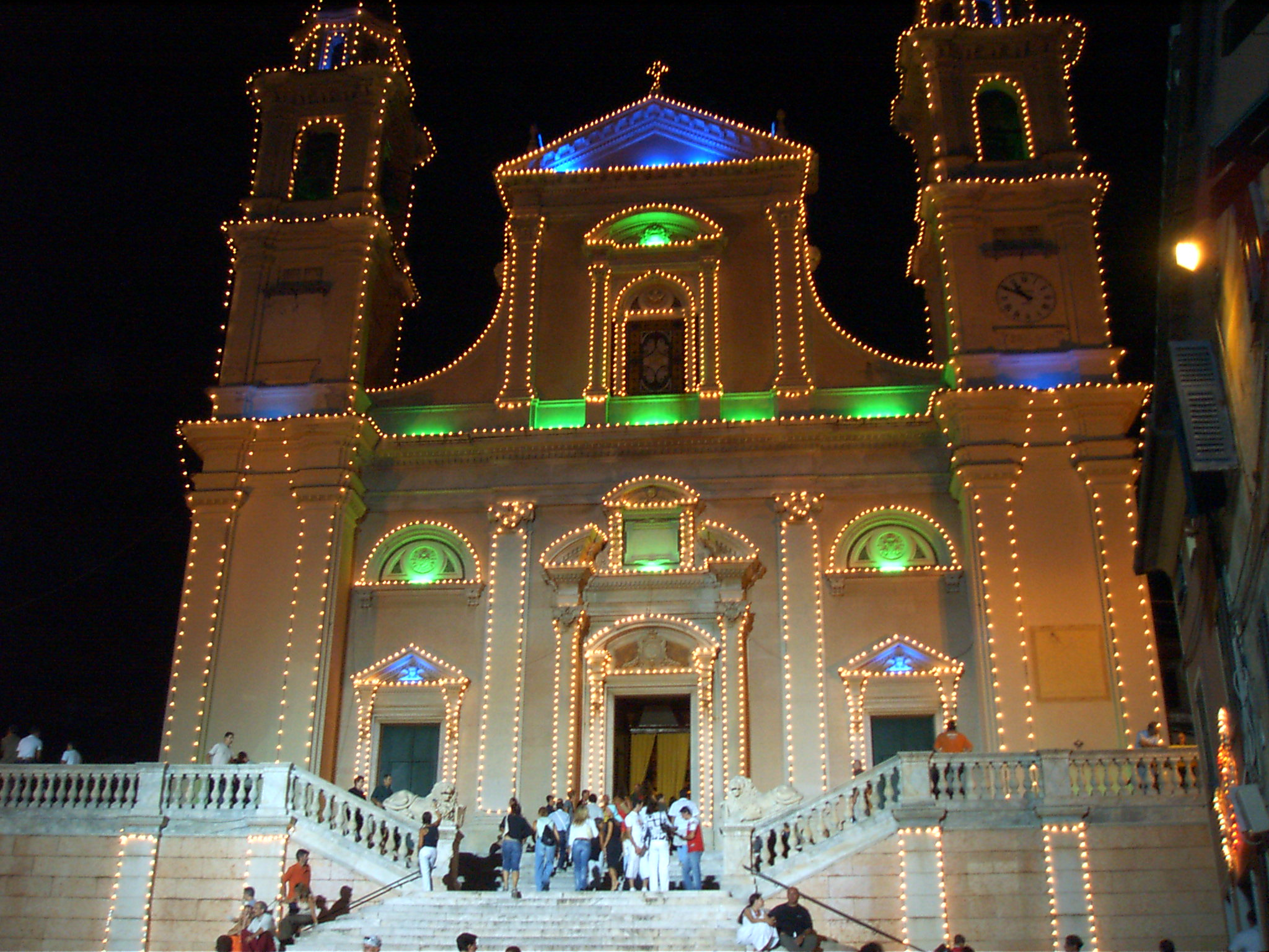 La chiesa di Santo Stefano durante la torta dei Fieschi 2005